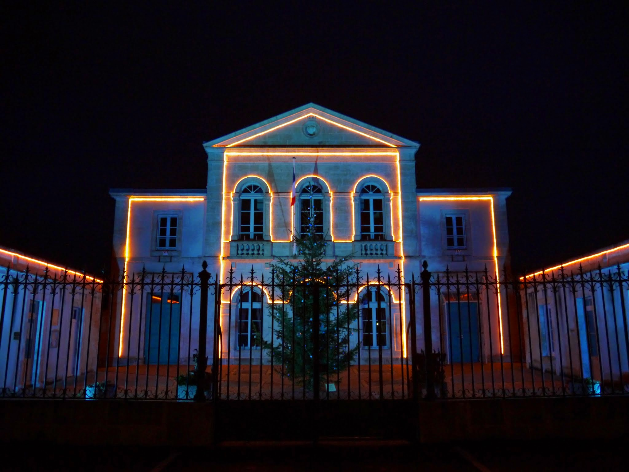 Illuminations de Noël à la mairie.